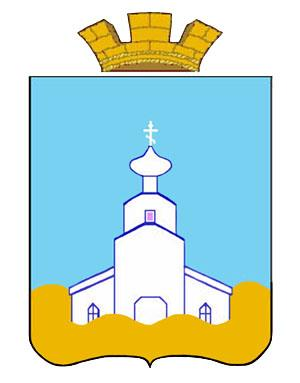 Герб муниципального образования города Куртамыш